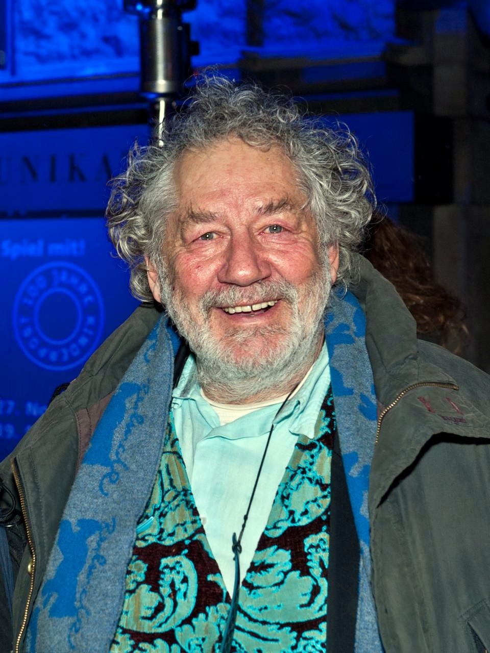 Chiem van Houweninge, Dutch actor and script writer, Berlinale 2012, ARD Degeto Blue Hour Party, Deutschen Fernsehzuschauern wohl am besten bekannt als „Hänschen“ (Hans Scherpendeel) aus den Schimanski-Tatorten.